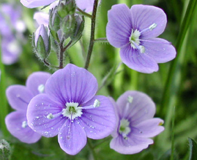 Veronica chamaedrys